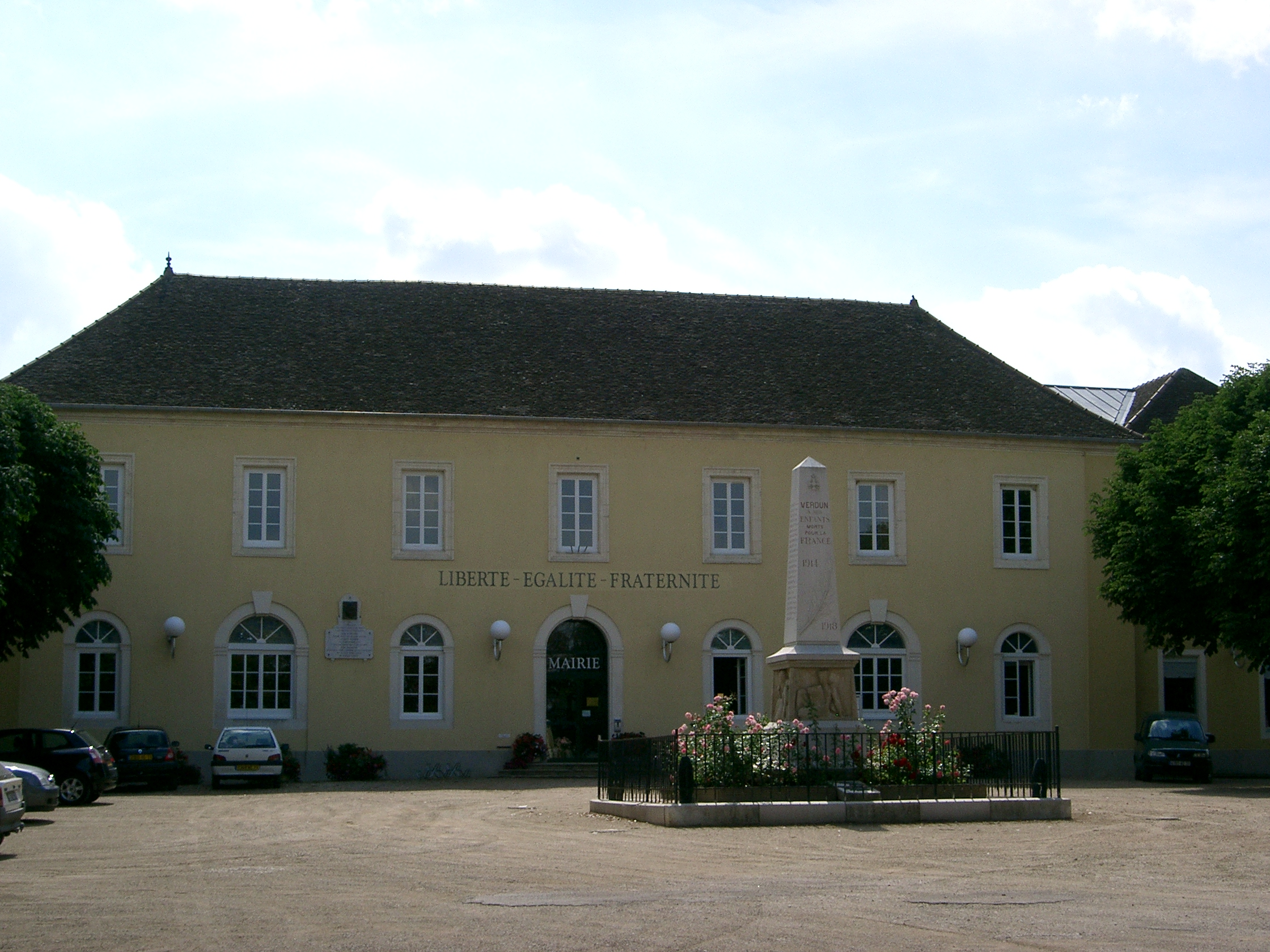 Mairie de Verdun-sur-le-Doubs (Saône et Loire - France)